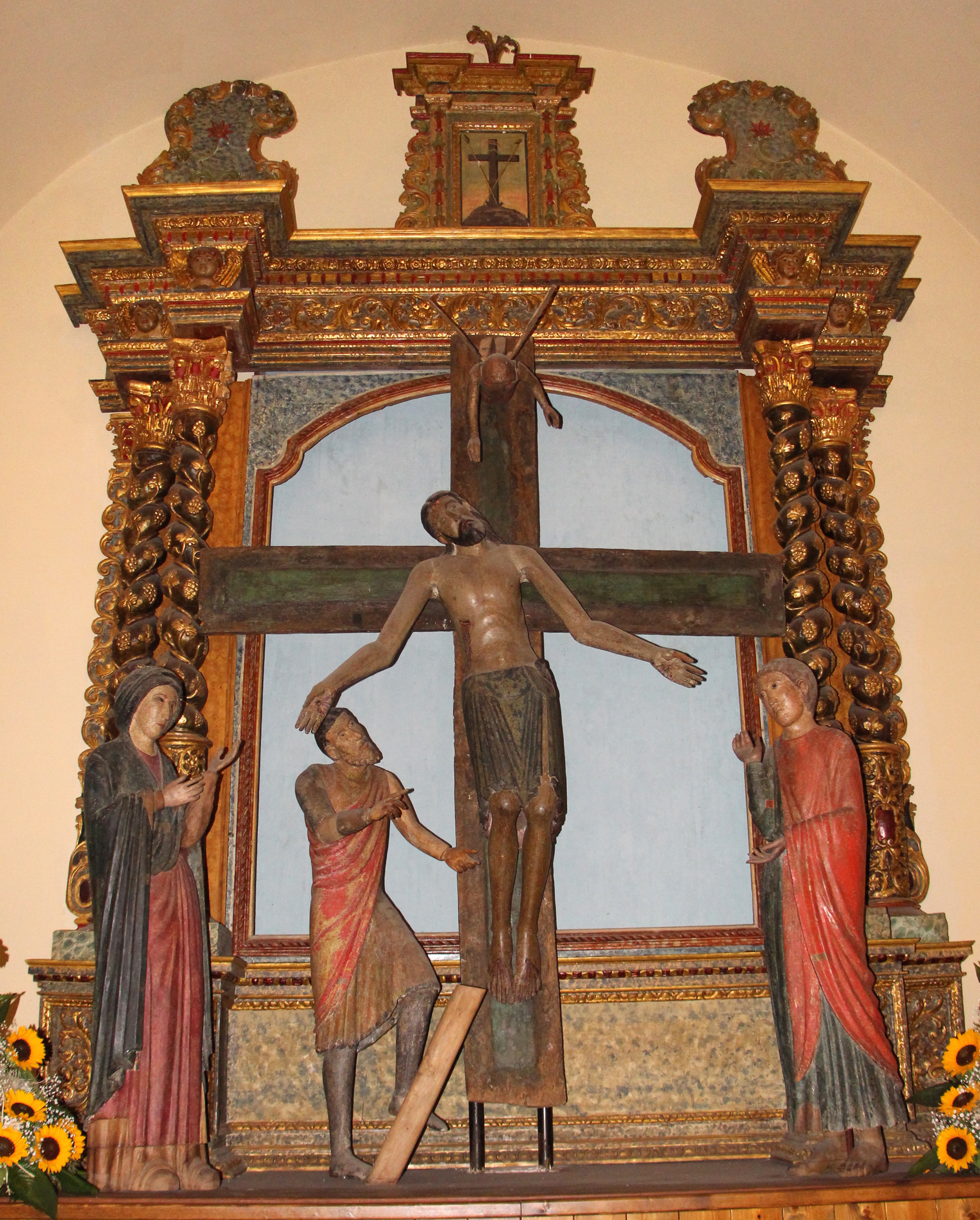 Bulzi (SS)